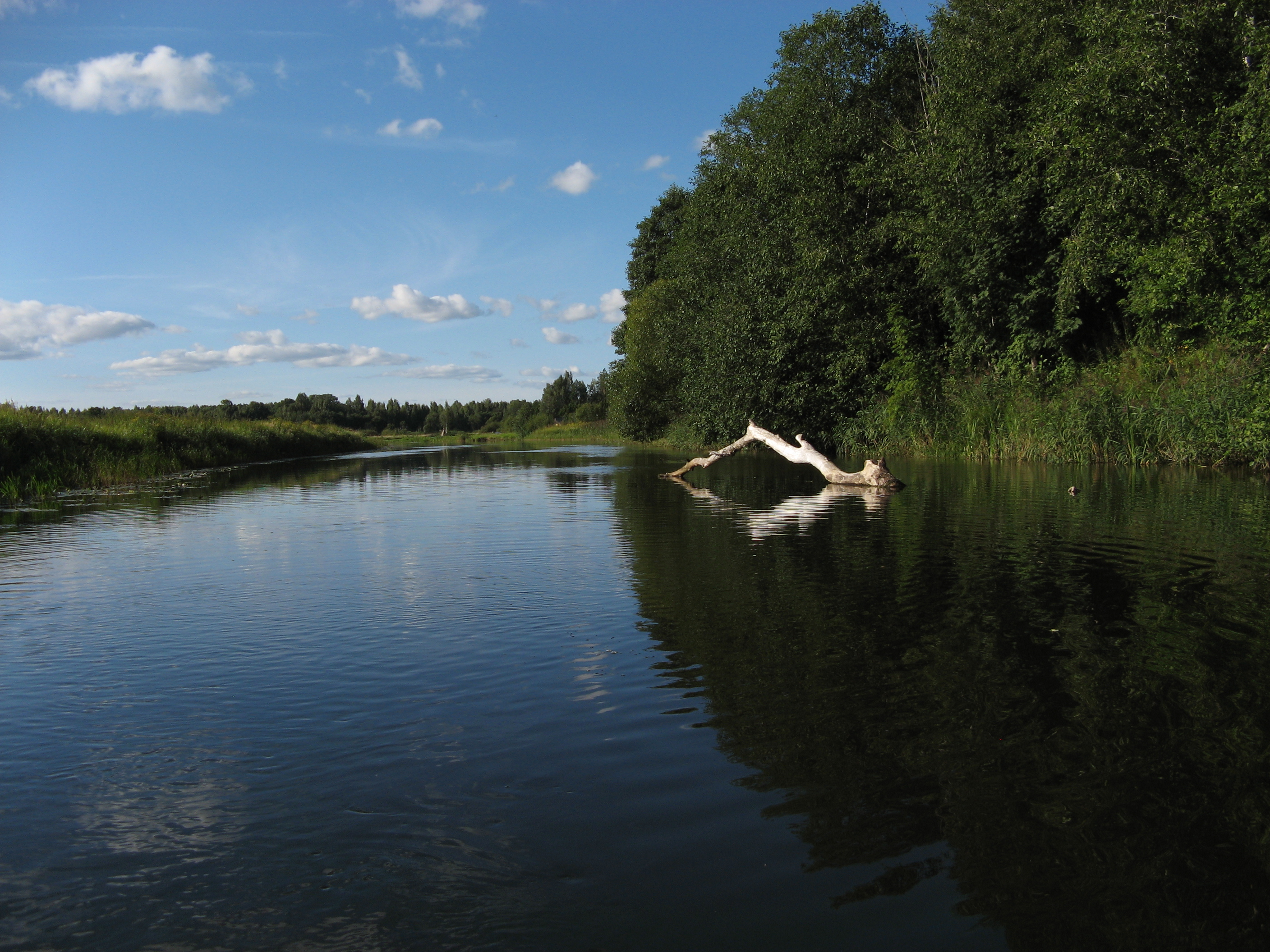 Ahja jõgi Lääniste ja Ibaste vahel